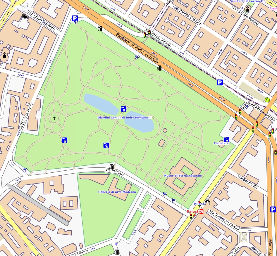 Mappa odierna dei giardini pubblici Indro Montanelli - Milano